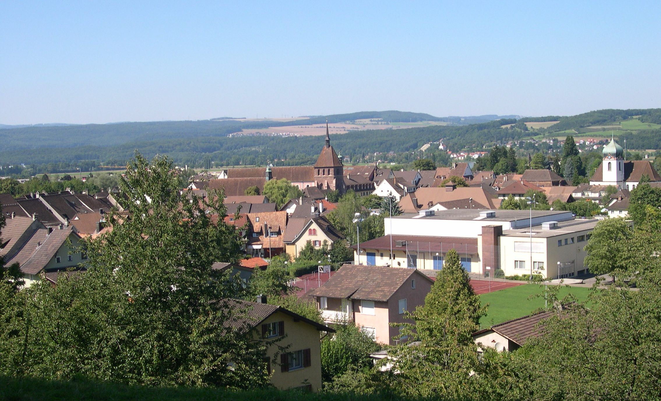 Blick auf Zurzach vom Lusthüüsli aus.